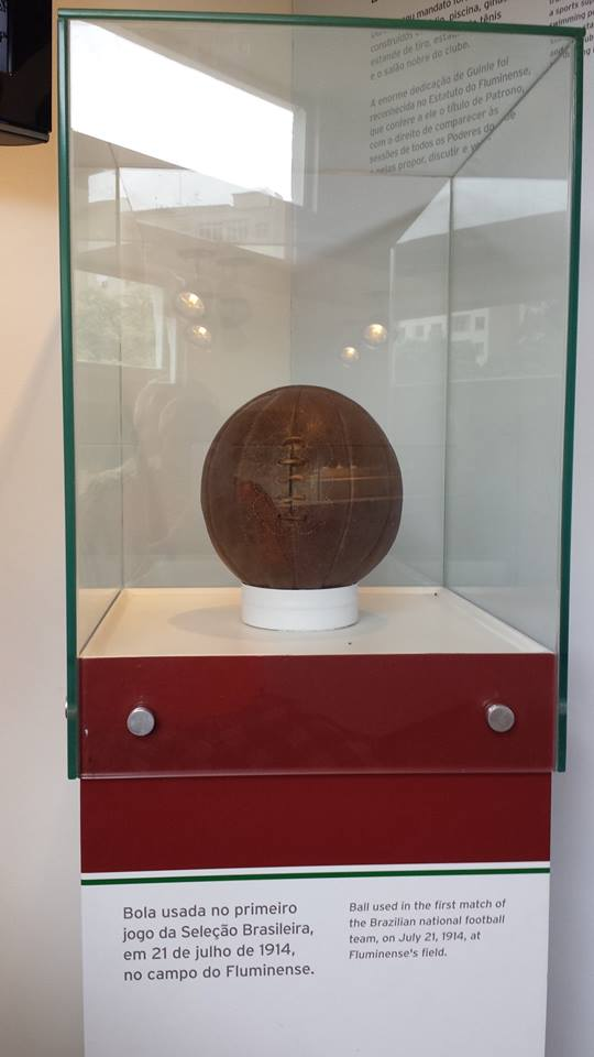 Bola utilizada na primeira partida da Seleção Brasileira de Futebol exposta na Sala de Troféus do Fluminense Football, local da partida.